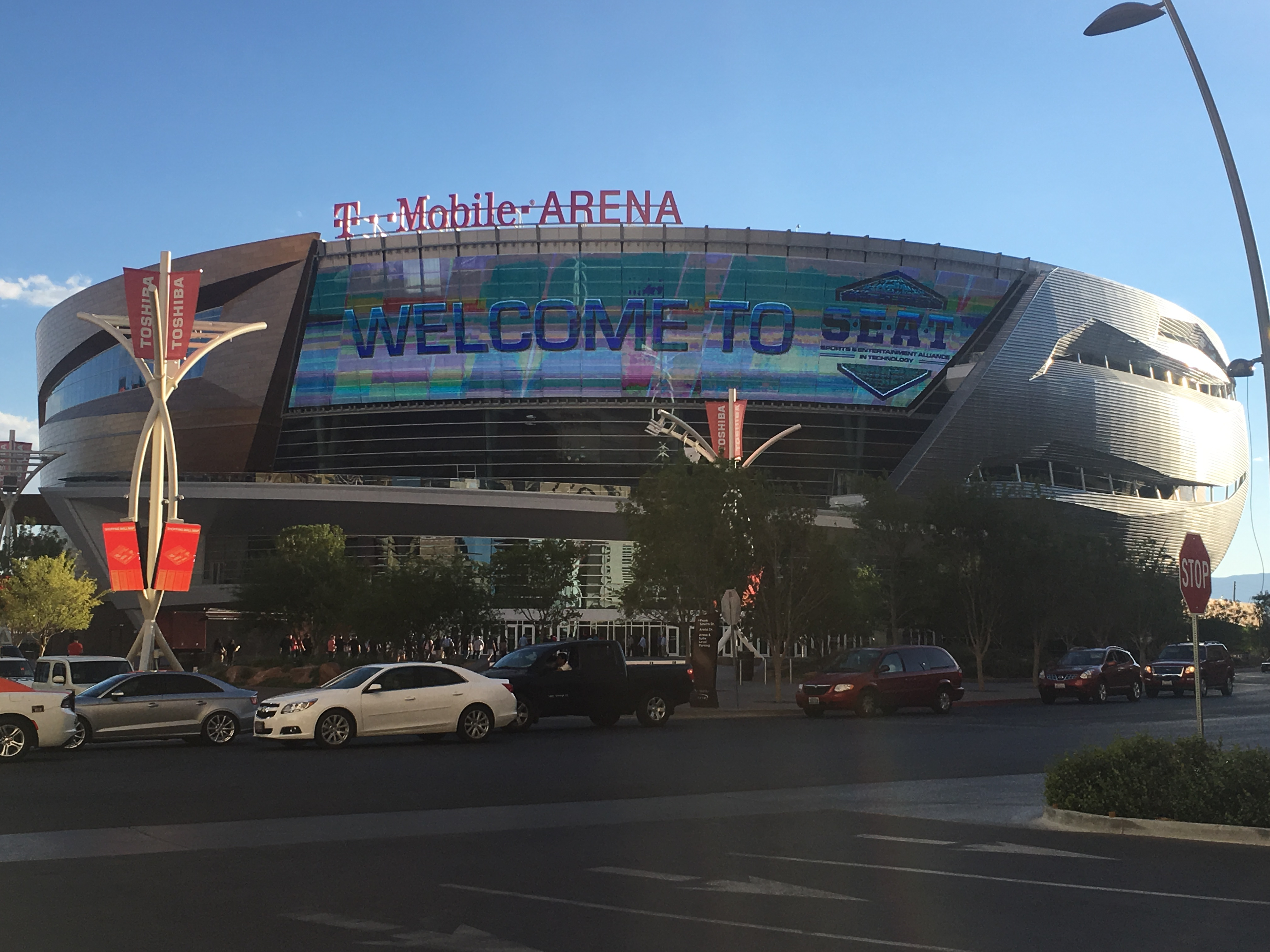 T-Mobile Arena, Las Vegas